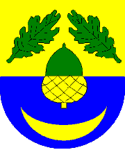 znak obce Dubčany